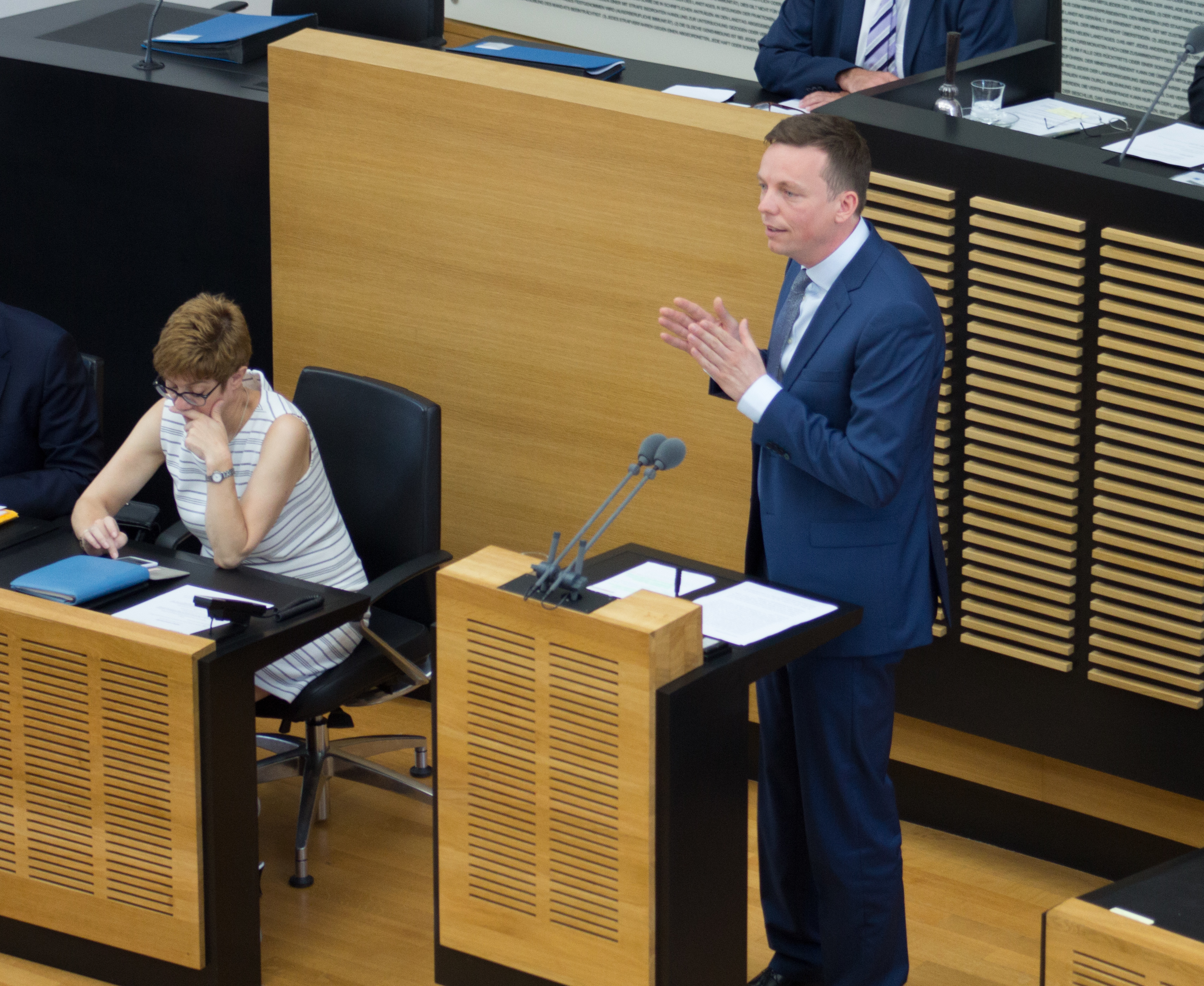 Plenarsitzung am 21. Juni 2017 im Landtag des Saarlandes -CDU Fraktionsvorsitzender Tobias Hans